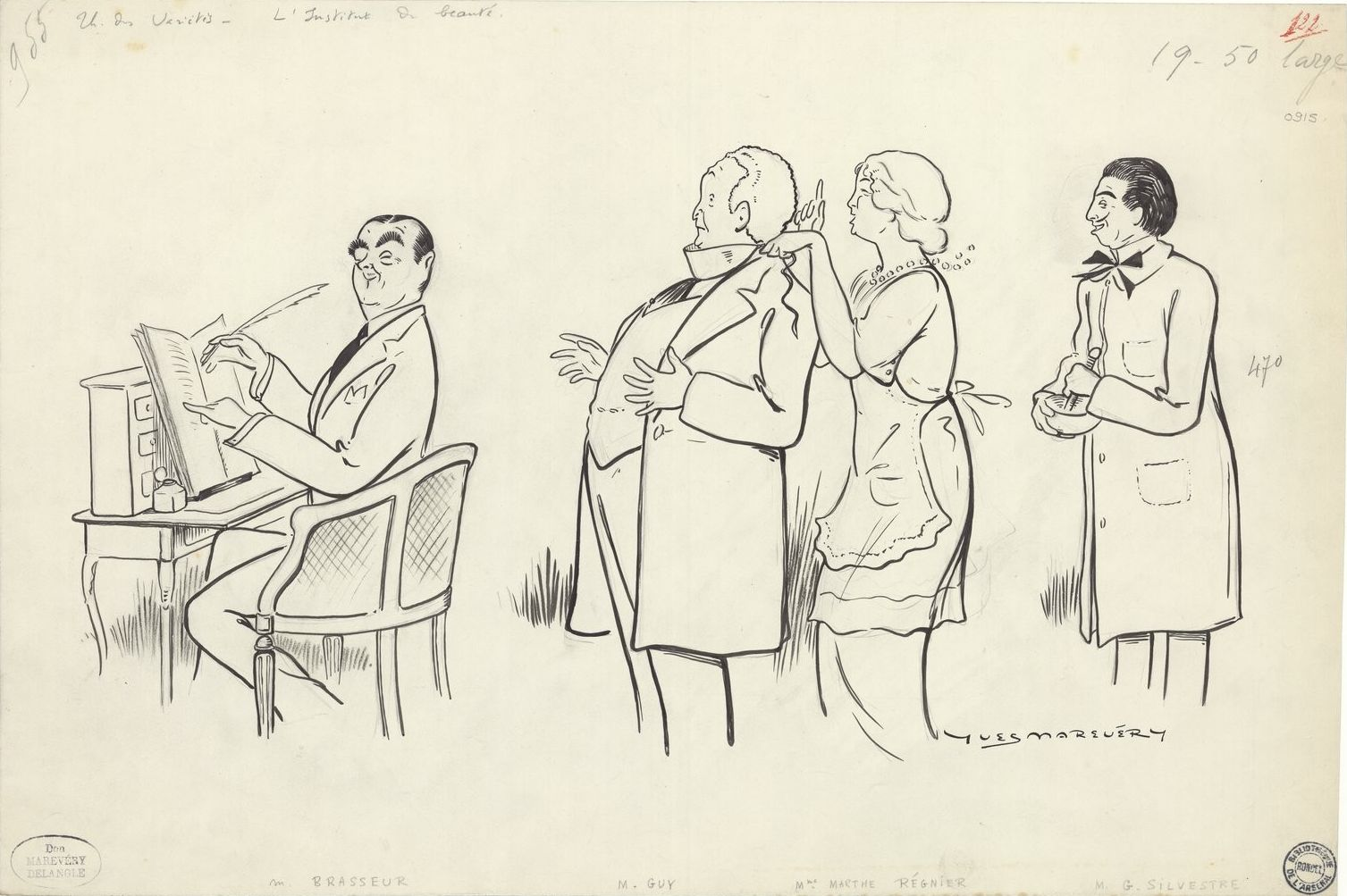 "L'Institut de Beauté", d'Alfred Capus / dessin de Yves Marevéry, Albert Brasseur, Guy, Marthe Régnier, Gaston Sylvestre